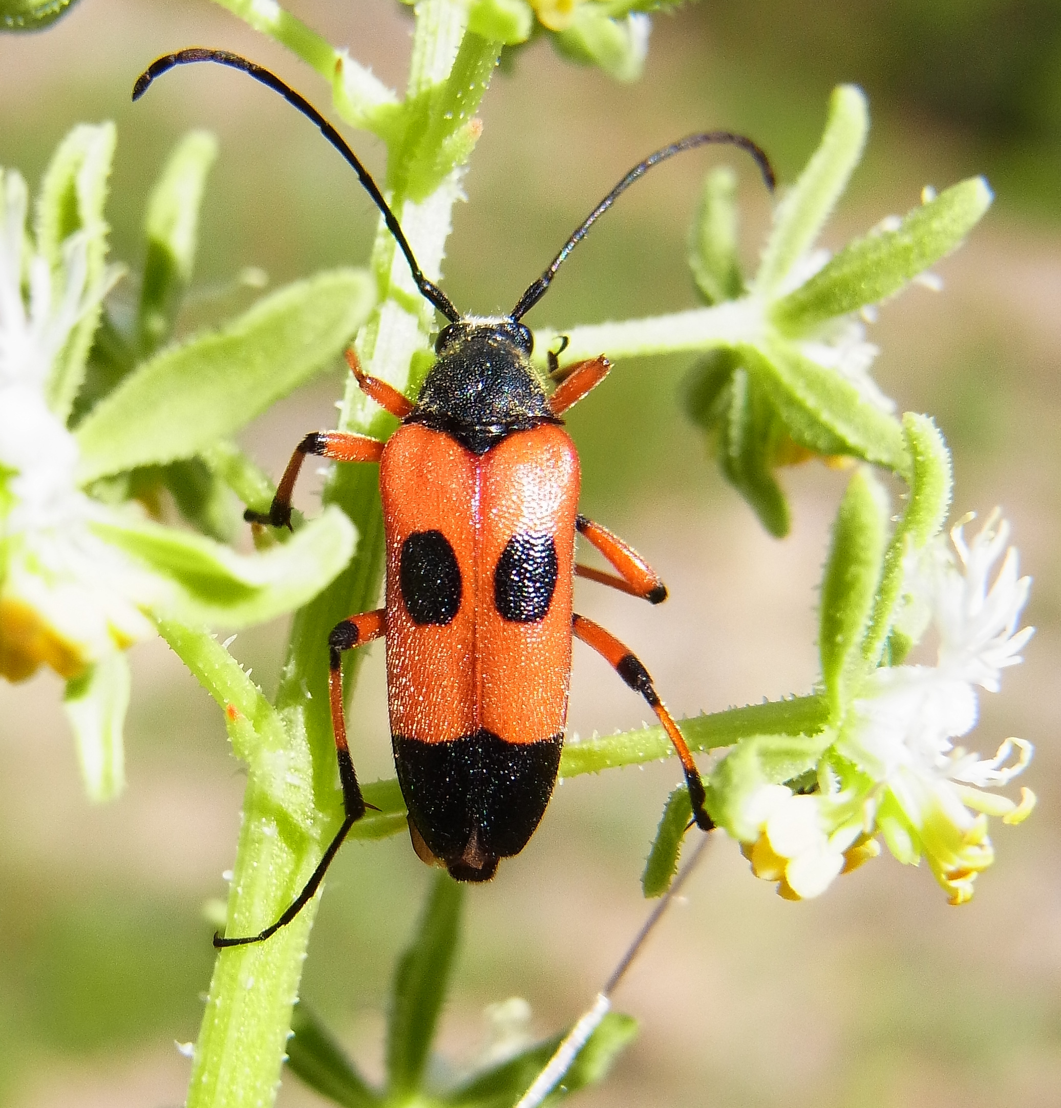 Nustera distigma aus Spanien, bei Caspe, Zaragosa, Katalonien, am 1. Juni 2013